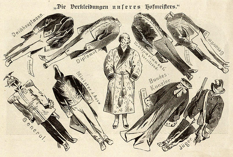 Bismarck-Album des Kladderadatsch. "Die Verkleidungen unseres Hofmeisters." Karikatur auf Bismarck, dessen verschiedenen Staatsämter an Kostüme einer Pappfigur erinnern.